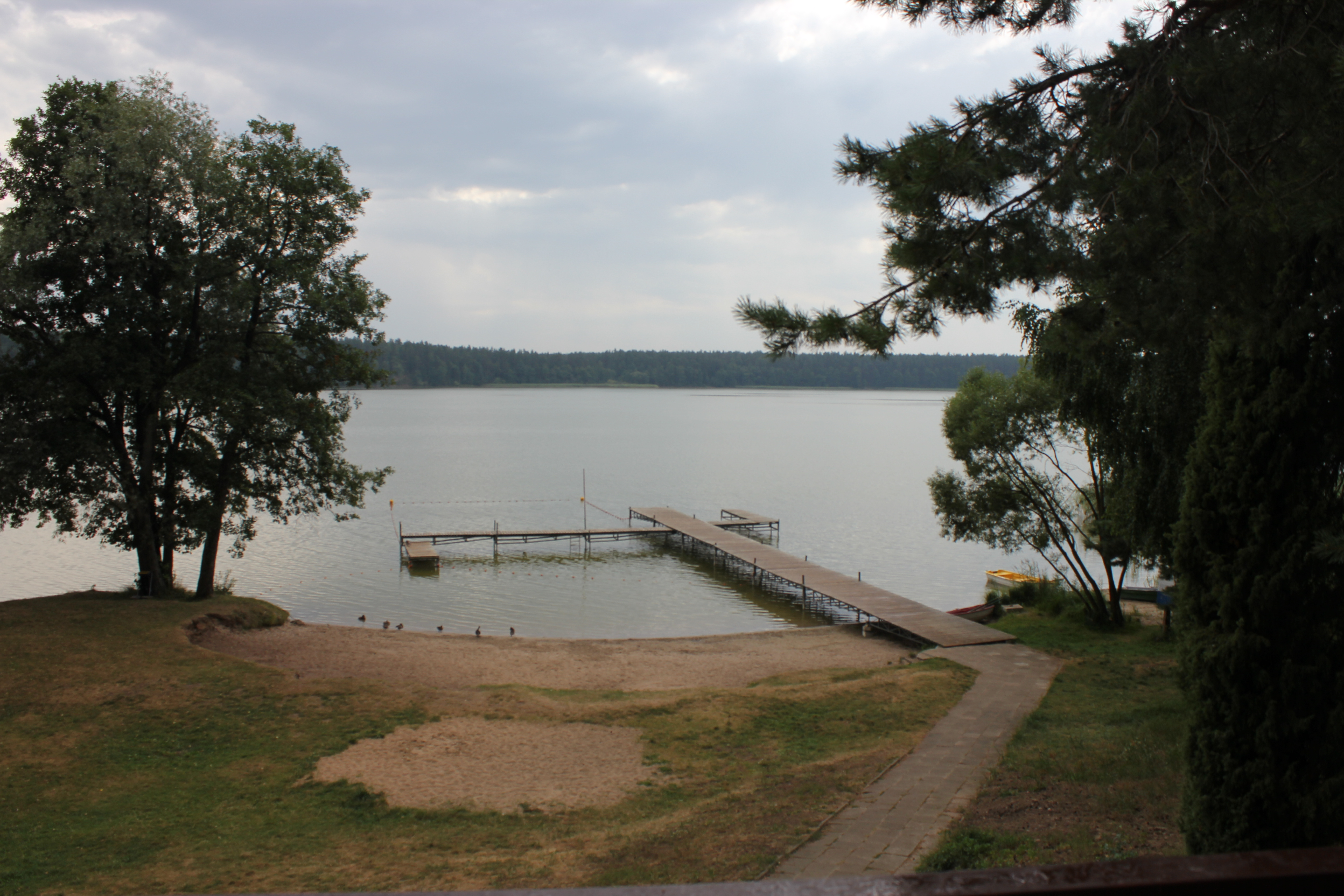 Pomost ośrodka wypoczynkowego "Skowronek" nad jeziorem Sajno w pobliżu Augustowa